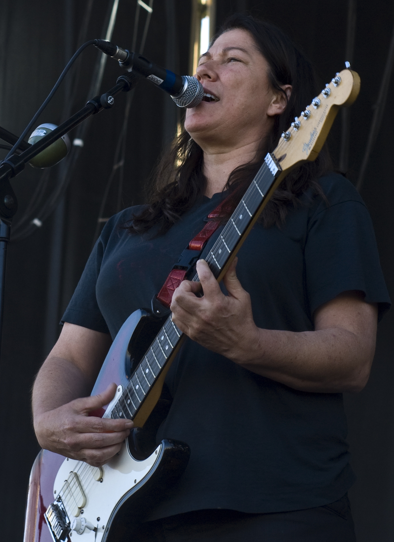 Kelley Deal Summercase 2008 La hermana gemela de la bajista de los Pixies llevo casi todo el peso vocal de la actuación....